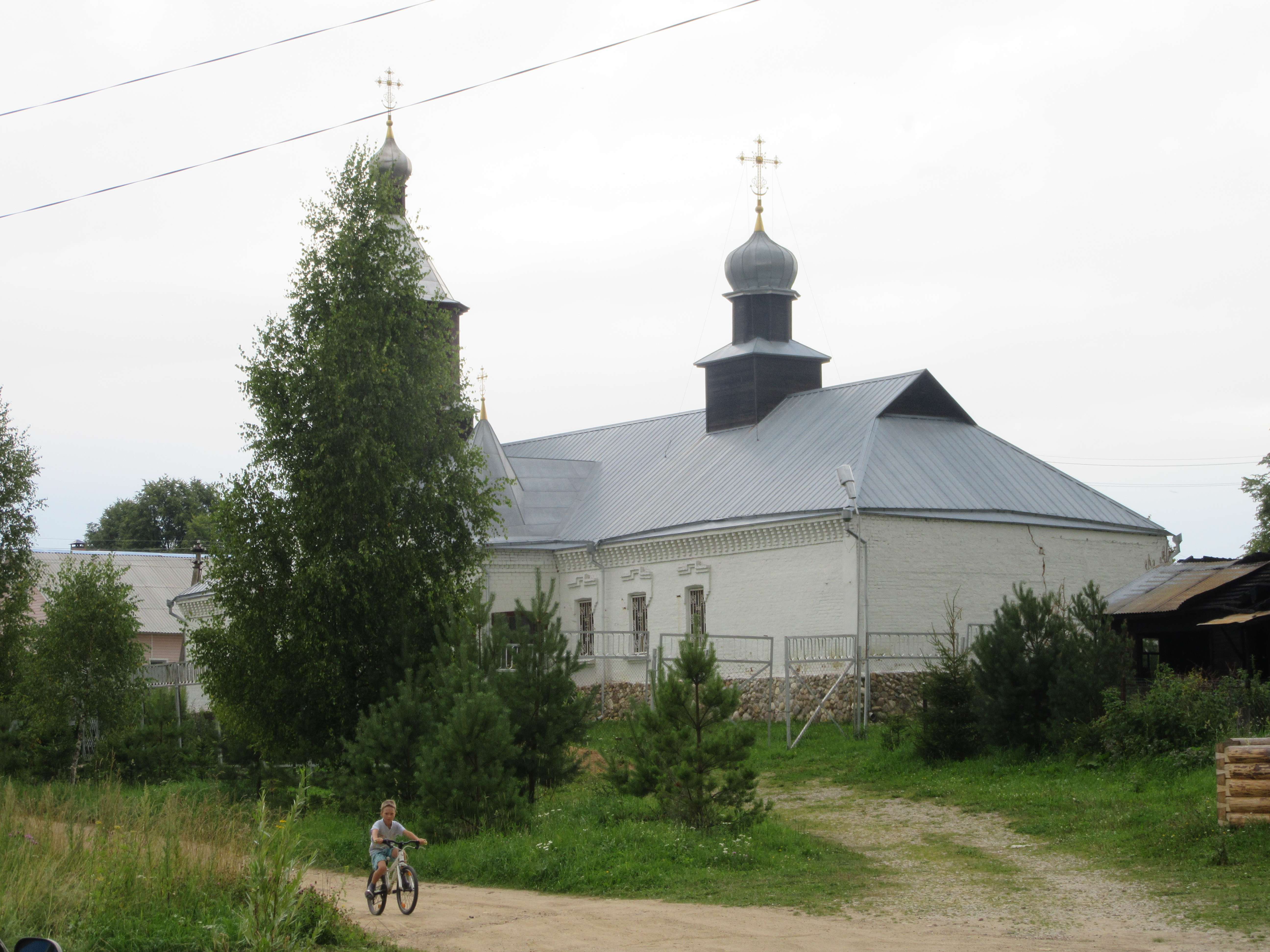 Церковь Рождества Христова в Шанском заводе